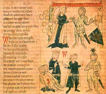 Auschnitt aus einer Seite einer Willehalm-Handschrift (Cgm 193,III, aus Sachsen, Umkreis Quedlinburg/Halberstadt, um 1270 - 1275).